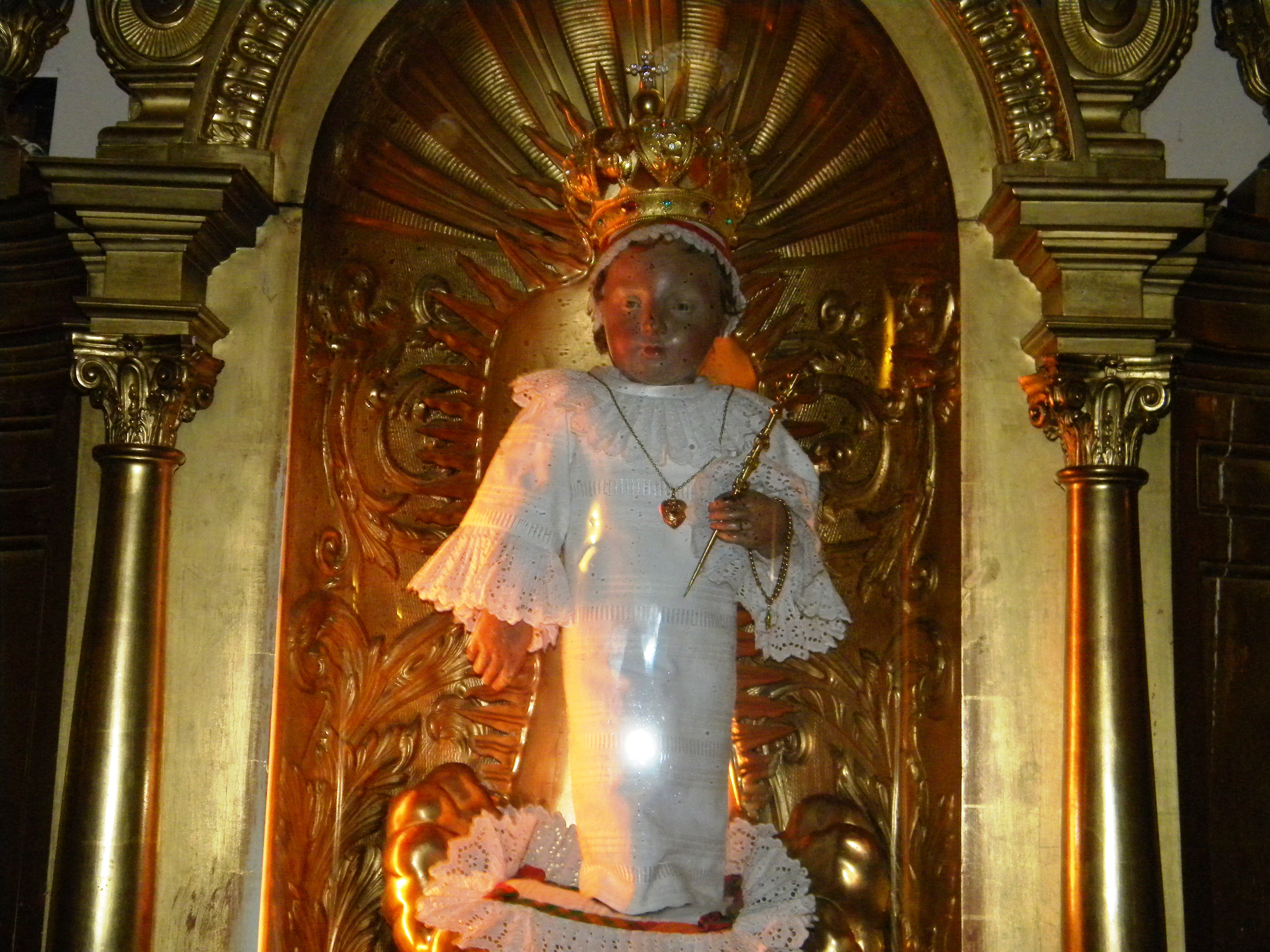 Statue du petit roi de grâce